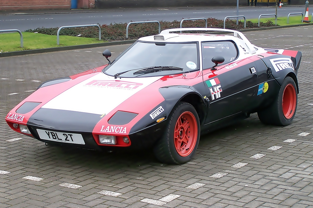 004 YBL 2T Lancia